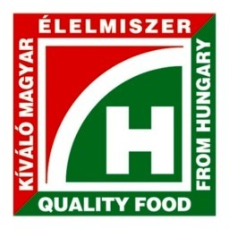 logó